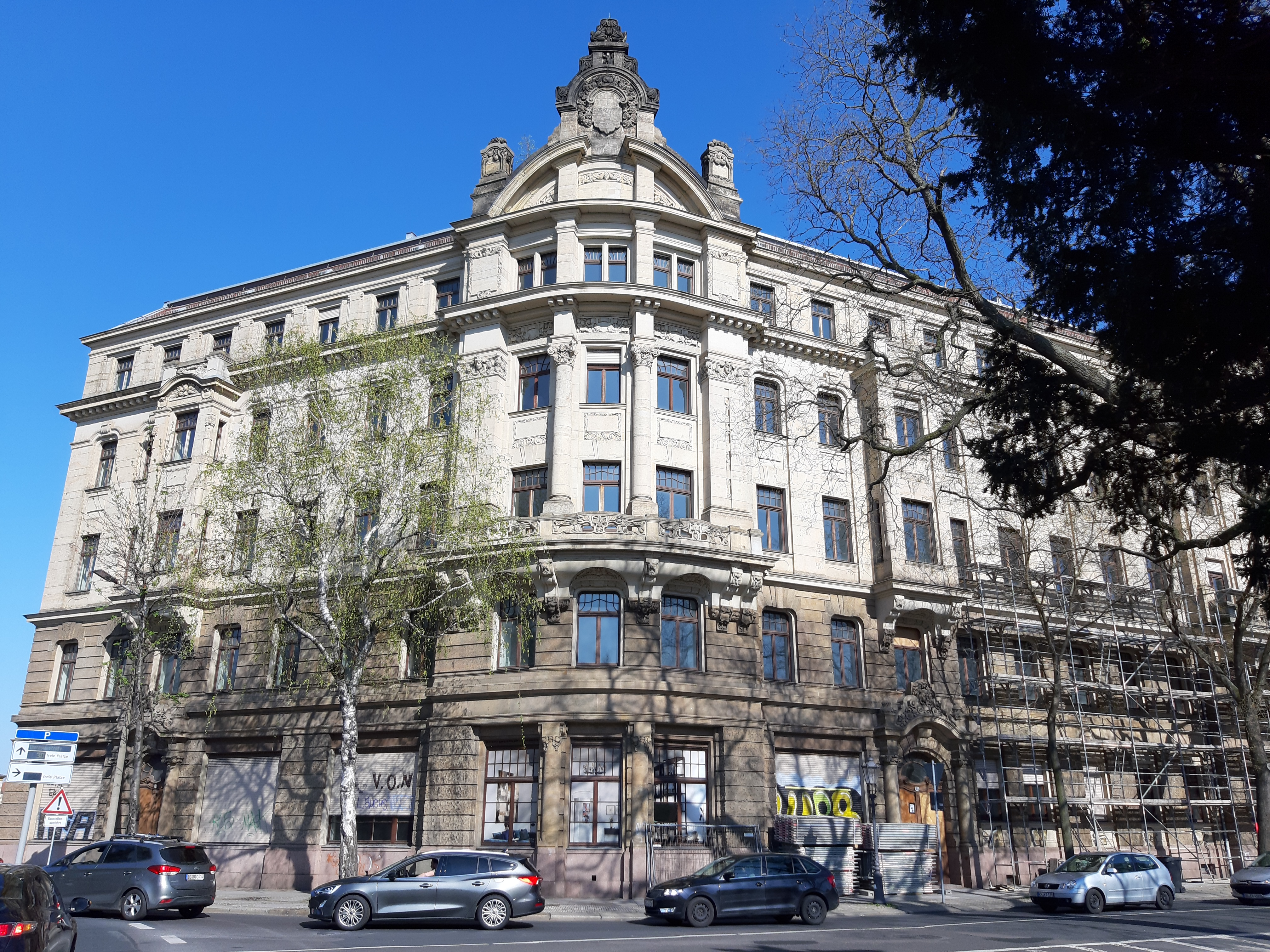 Brandversicherungsanstalt Dresden, Palaisplatz 2a bis 2d, zum Start der Sanierung 2019